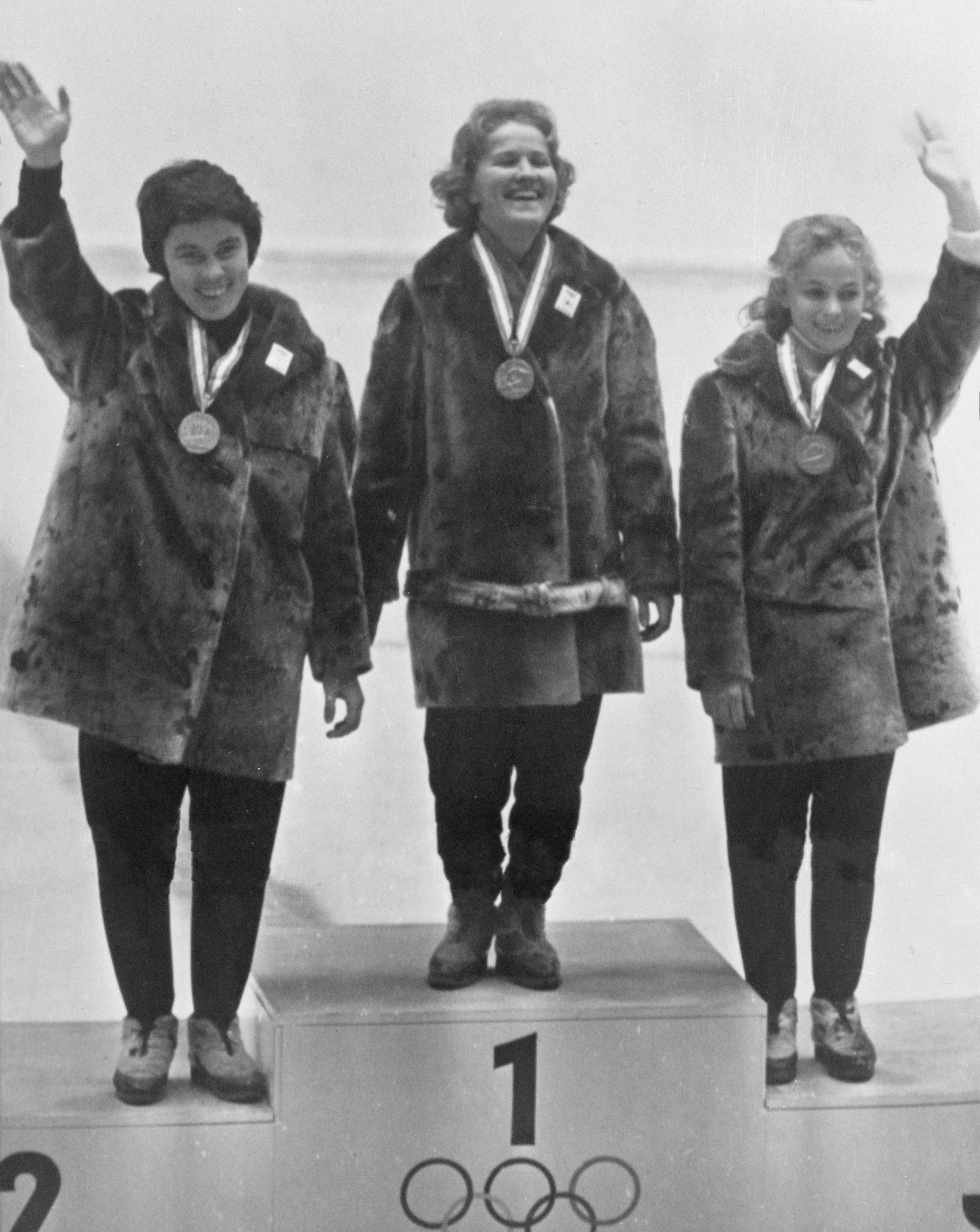 Irina Yegorova, Lidiya Skoblikova, Kaija Mustonen. Olympische Winterspelen 1964, de Russin Lydai Skobilokowa met gouden medaille op erepodium. Kaija Mustonen is identified by event date only.